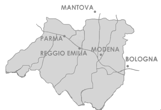 territoires où est produit le parmesan